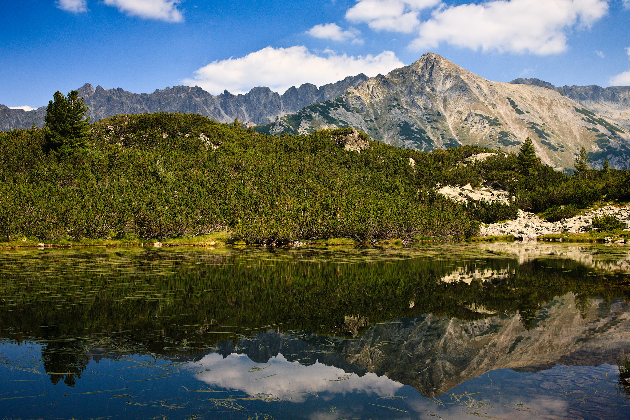 Пирин, Пирин, езеро в циркус Валявишки дупки и в. Газей насреща